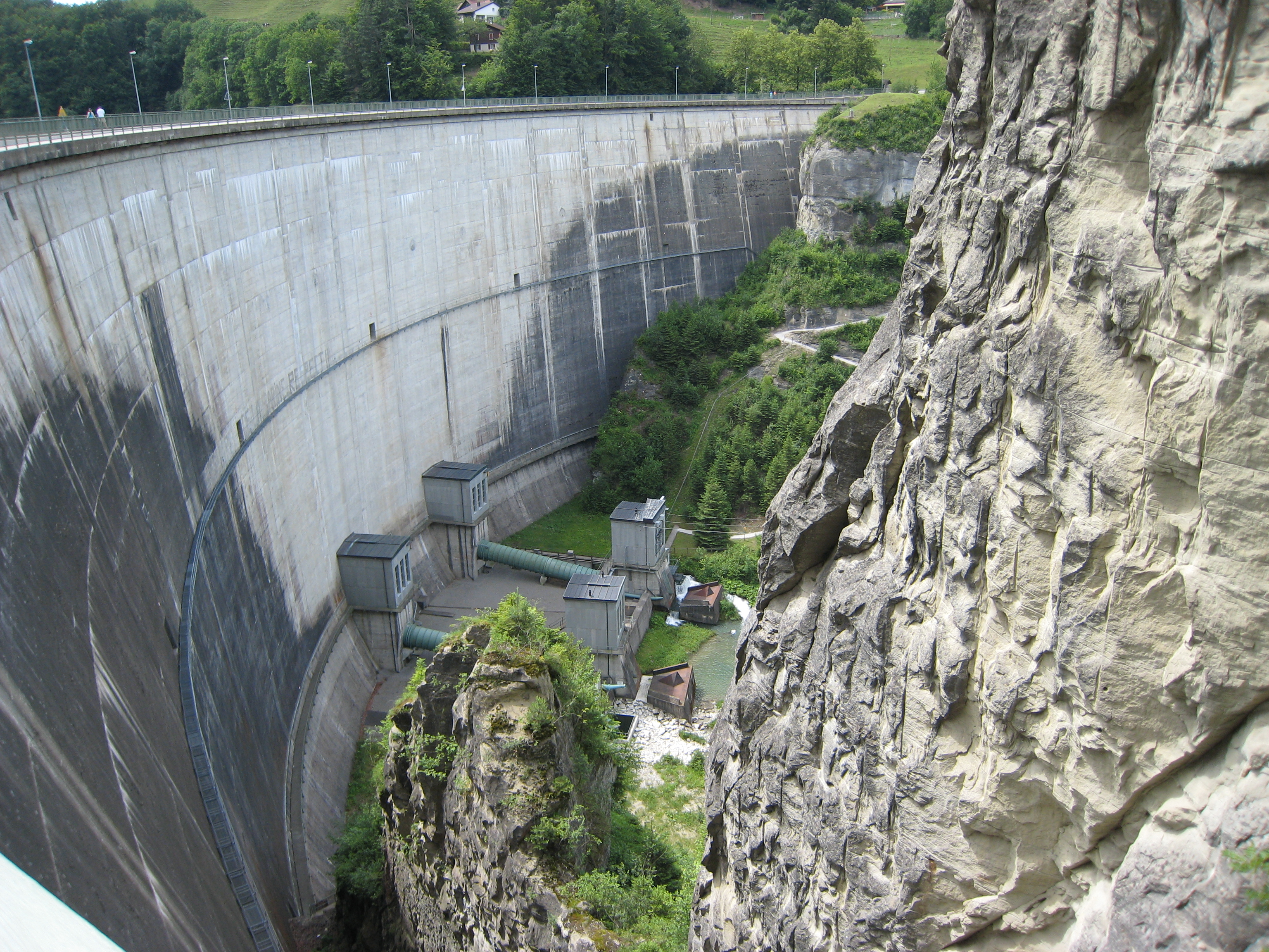 Barrage de Rossens 17-06-2007